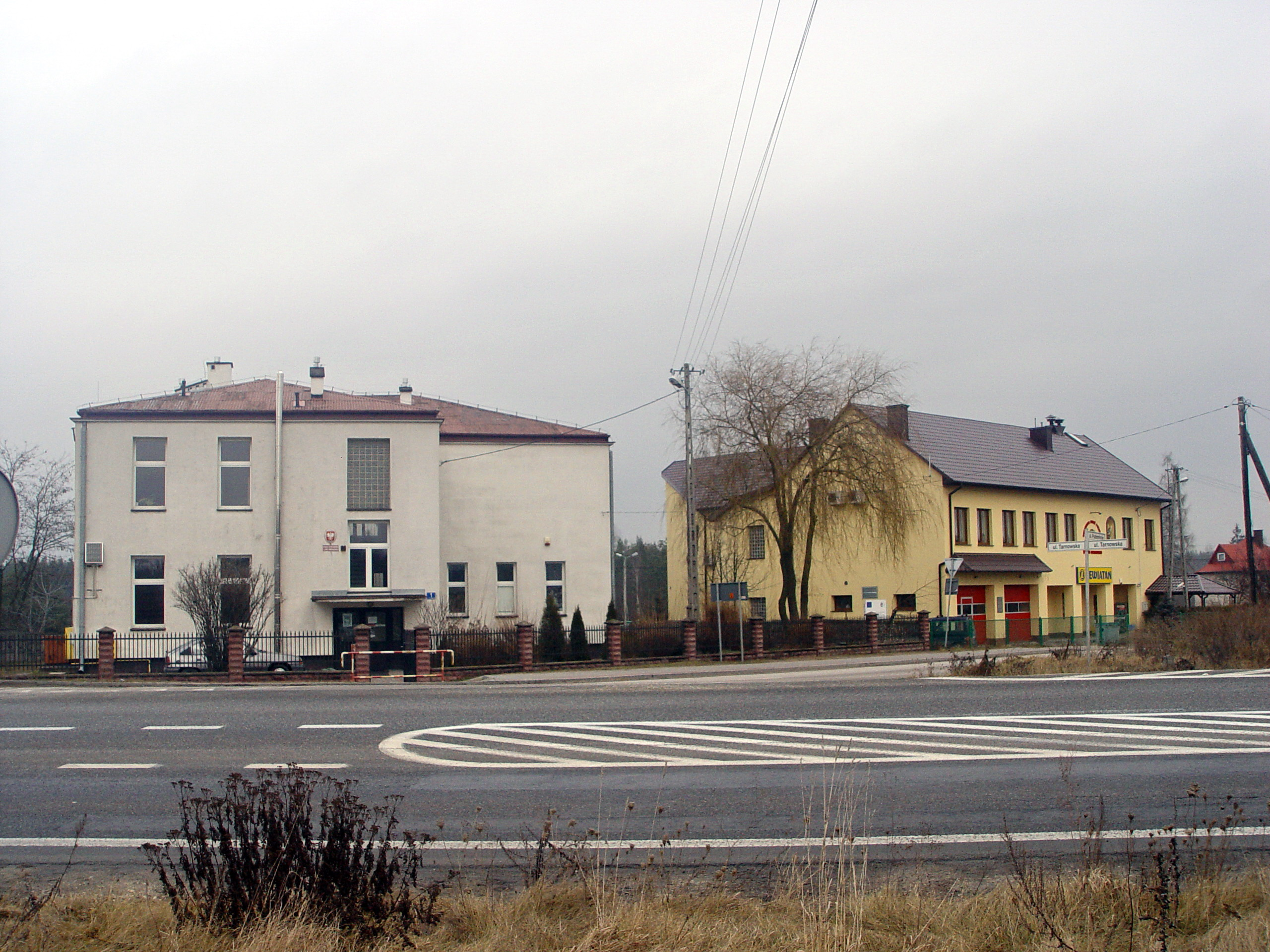 Wola Morawicka - miejscowa Szkoła Podstawowa i remiza Ochotniczej Straży Pożarnej.